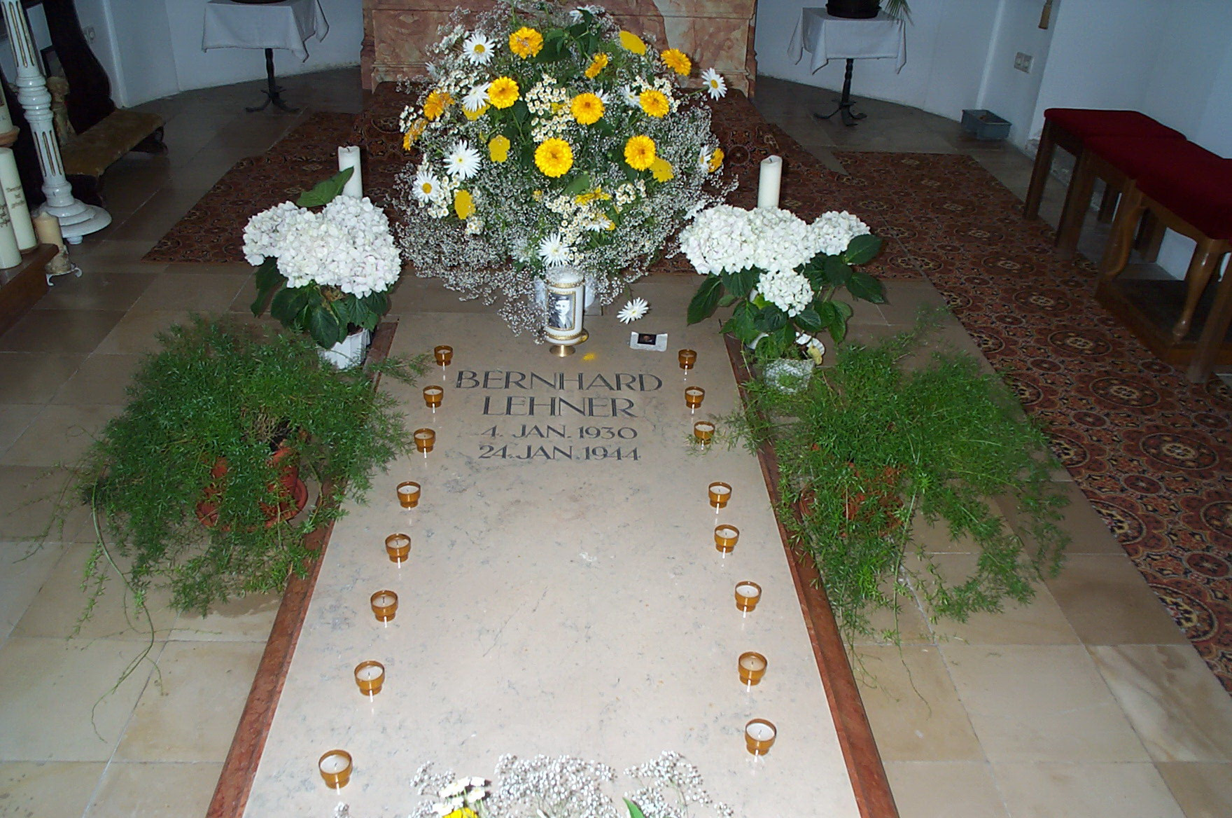 Herrngiesdorf, Bernhardstraße 23-25. Katholische Kirche St. Martin. Im Chor befindet sich die Gruft von Bernhard Lehner, einem Sohn der Gemeinde der 1944 mit nur 14 Jahren starb und für dessen Seligsprechung seit den 50er Jahren gebetet wird.